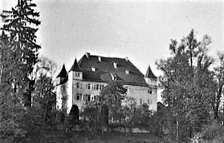 Schloss Mauren, Kreis Böblingenam, am 6. Mai 1928, also vor der Zerstörung im Jahr 1942 während des 2. Weltkriegs